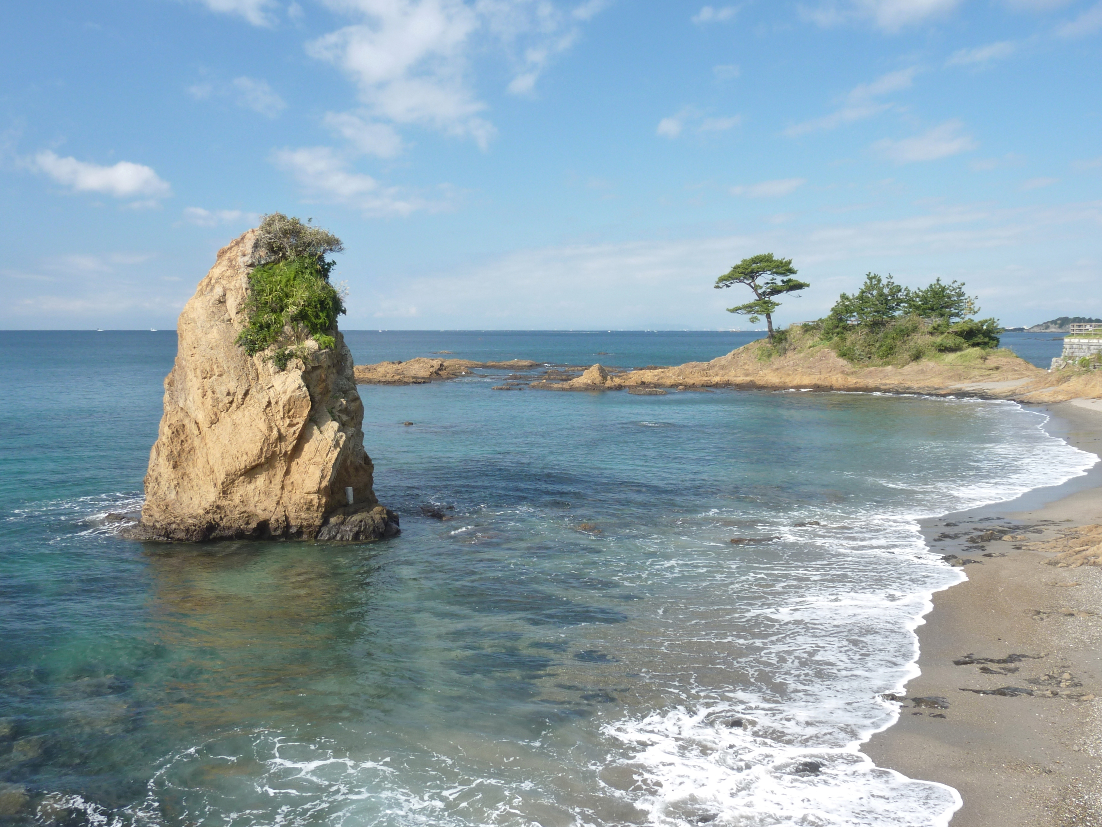 立石公園から見た立石と相模湾(神奈川県横須賀市)